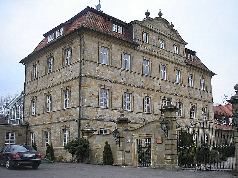 Schloss Gleusdorf (Landkreis Haßberge, Unterfranken). Ansicht von Südosten. Eigene Aufnahme, Dez. 2006 / Gleusdorf castle near Ebern (Lower Franconia, Bavaria, Germany). View from the south-east. Own photo, Dec. 2006